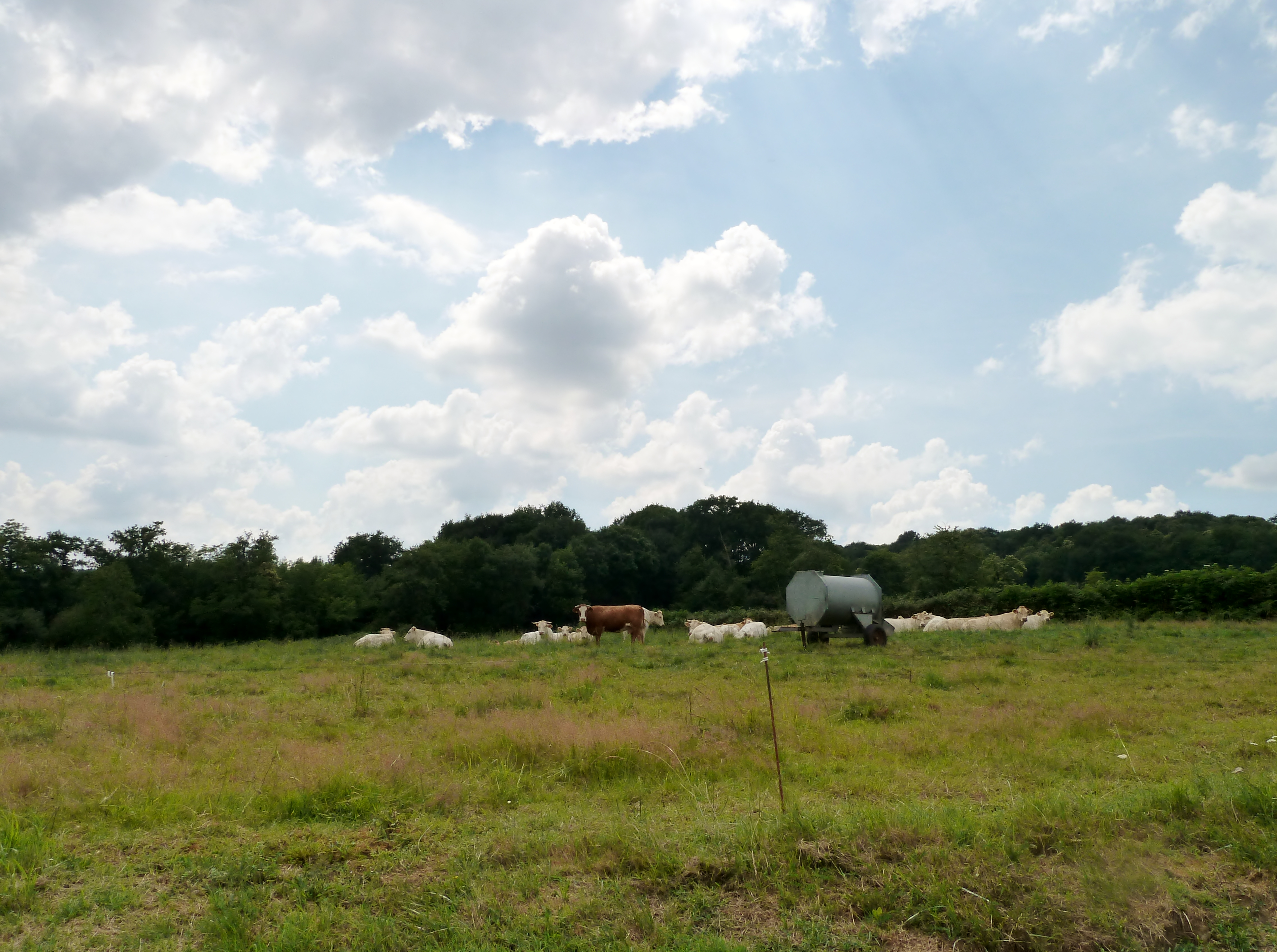 Vaches à Peyrelongue-Abos